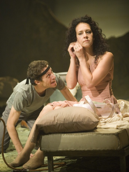 אדמה קדושה - צלם גדי דגון